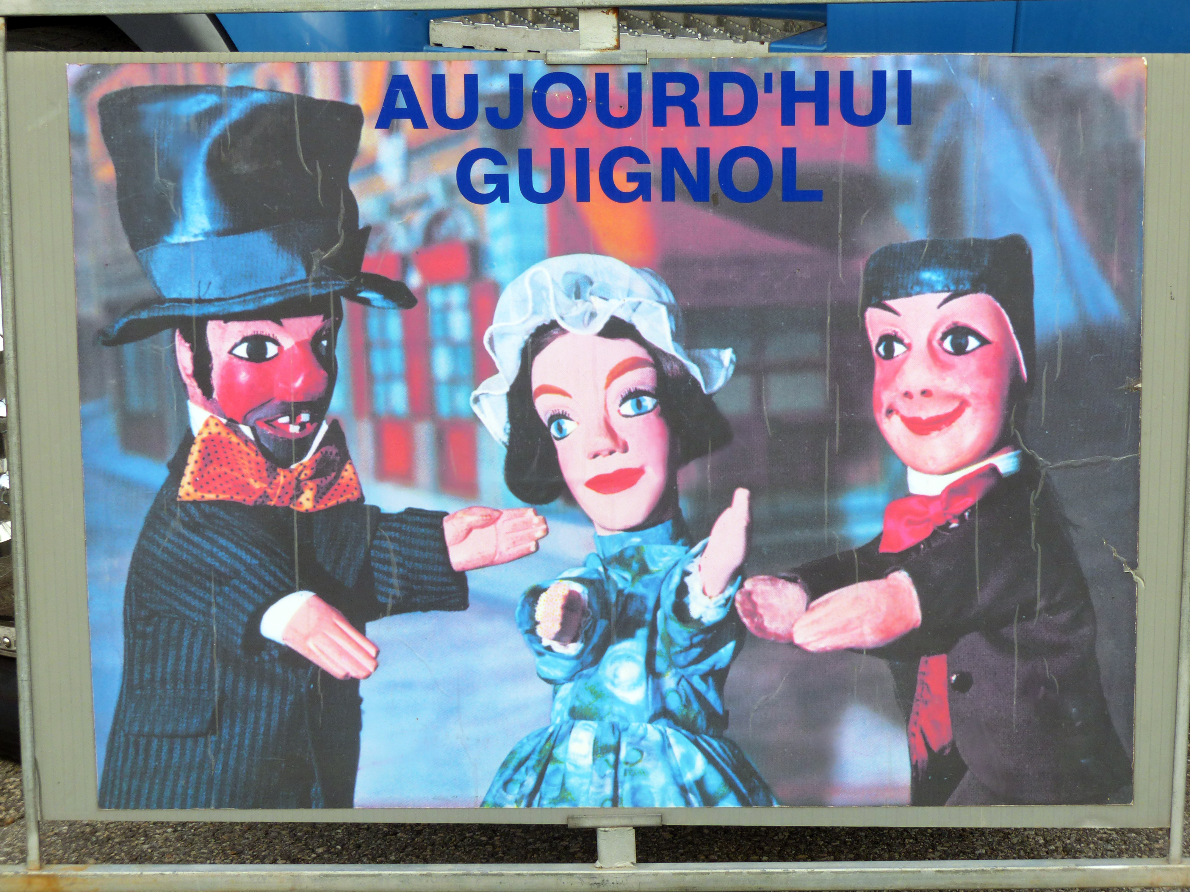 Theatre Guignol in Prévessin-Moëns - Plakate